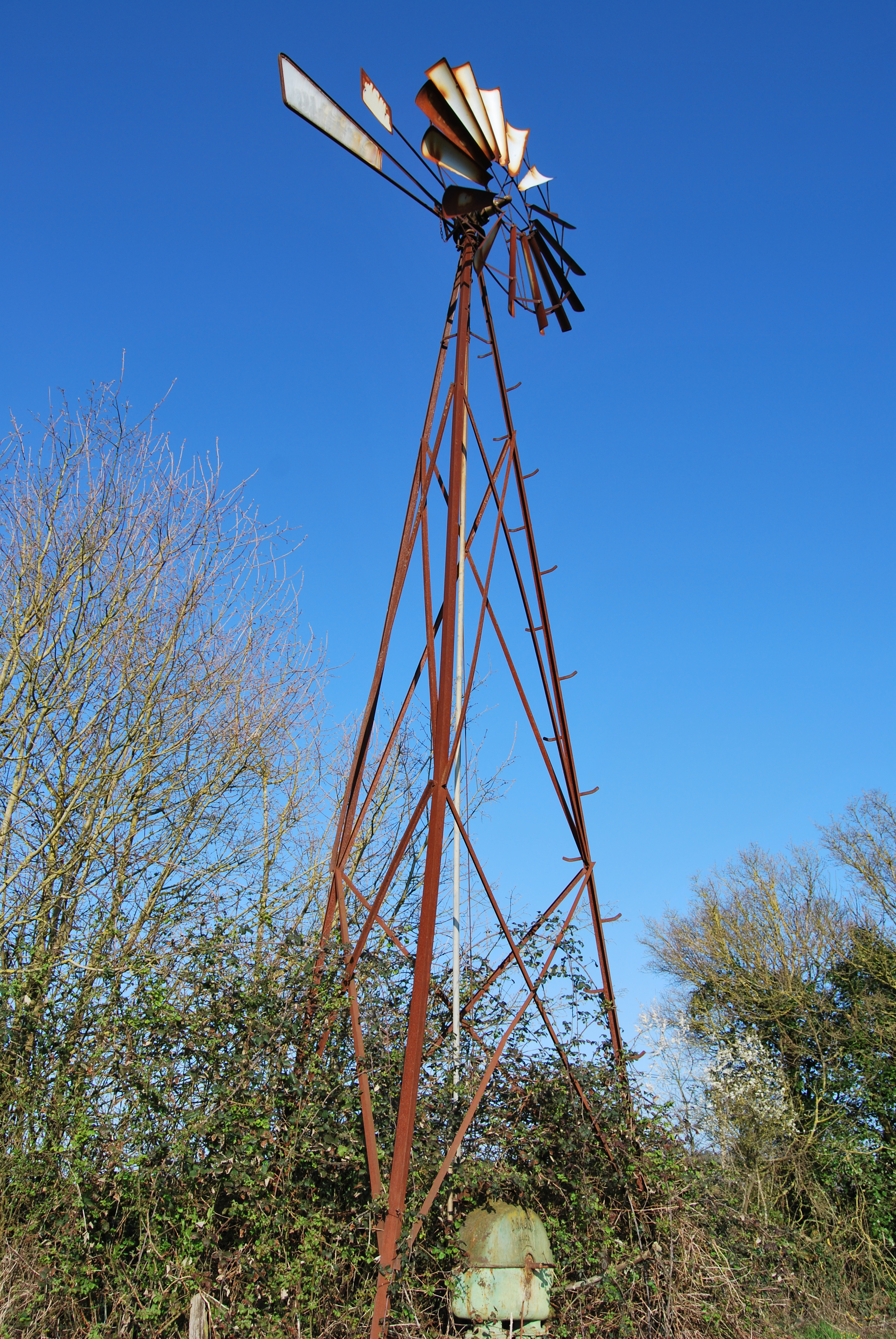 Éolienne à Saint-Georges-du-Bois dans le département français de la Sarthe, en avril 2010